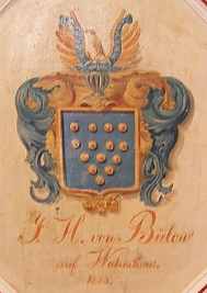 Familienwappen von Bülow in der Kirche von Wamckow